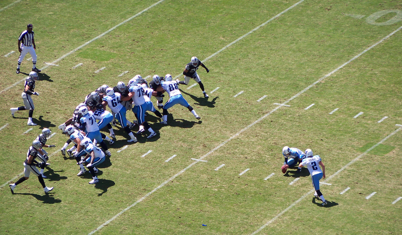 Tennessee Titans 38, Oakland Raiders 13 LP Field Nashville, Tennessee September 12, 2010